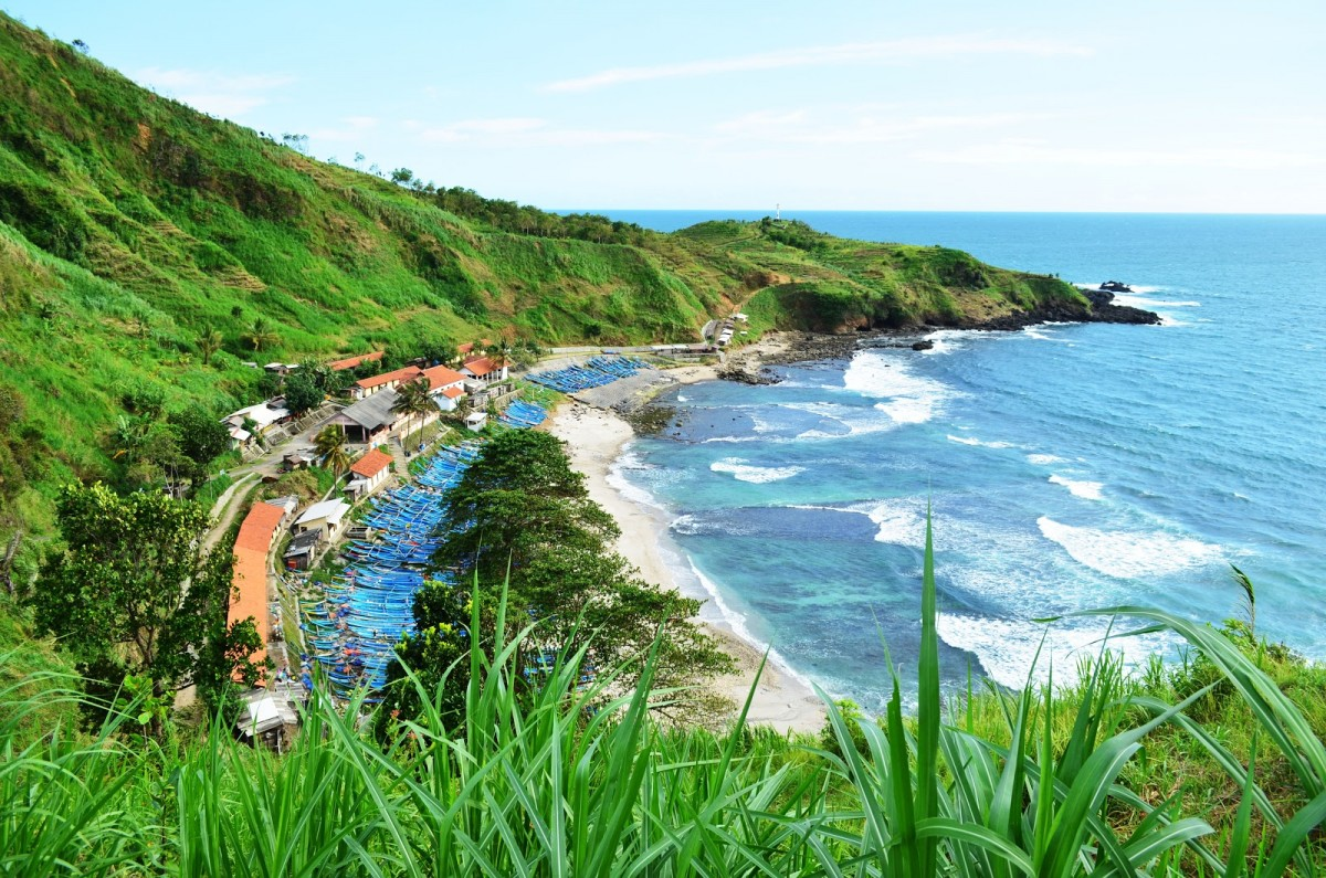 pantai menagnti